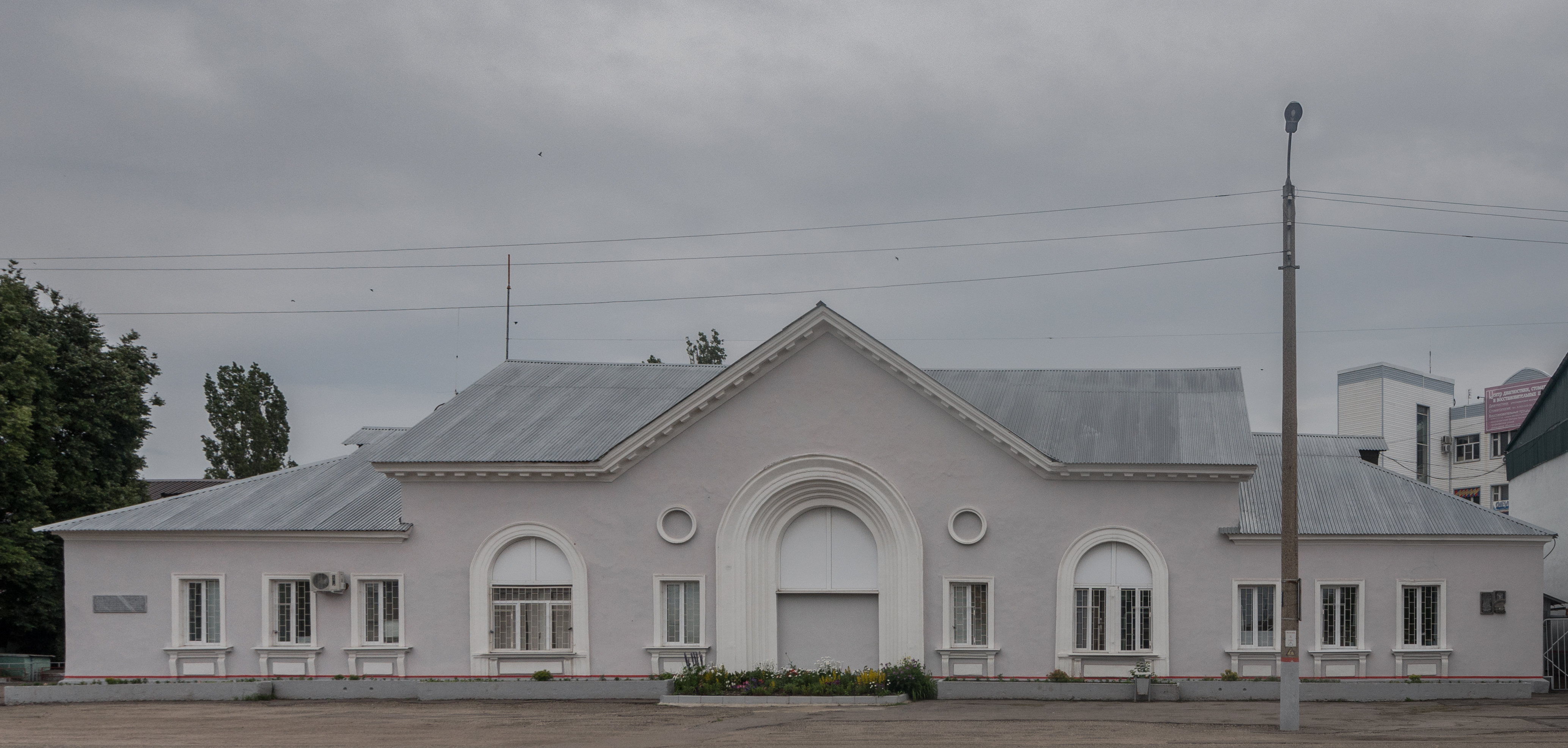 Здание железнодорожного вокзала: Ливны, Орловская область